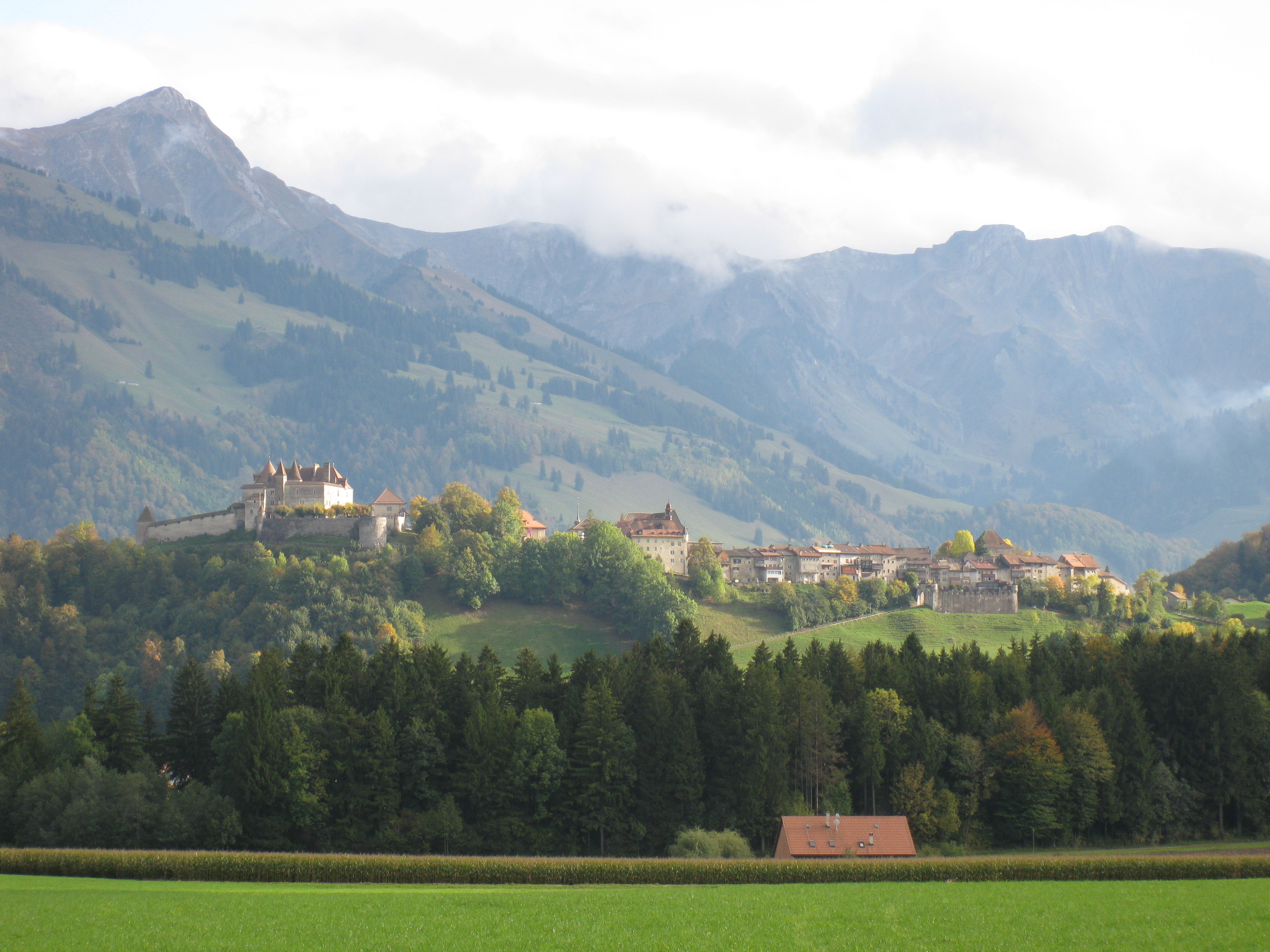 Cité médiévale très bien conservée. Le détour s'impose